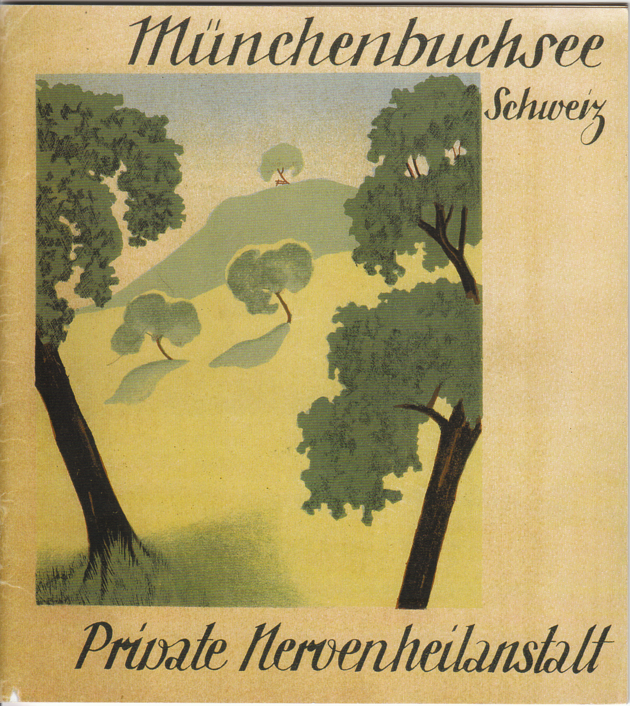 Prospekt der Privatklinik Wyss aus den 1930er-Jahren